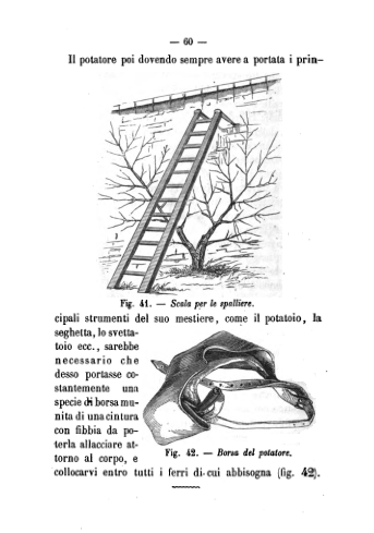 Scala da potatore. Dal volume "Corso teorico-pratico sopra la coltivazione e potatura delle principali piante fruttifere" dei fratelli Marcellino e Pietro Giuseppe Roda, 3a ed., 1869.